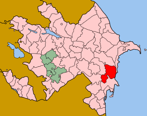 Map of Azerbaijan showing Salyan rayon.